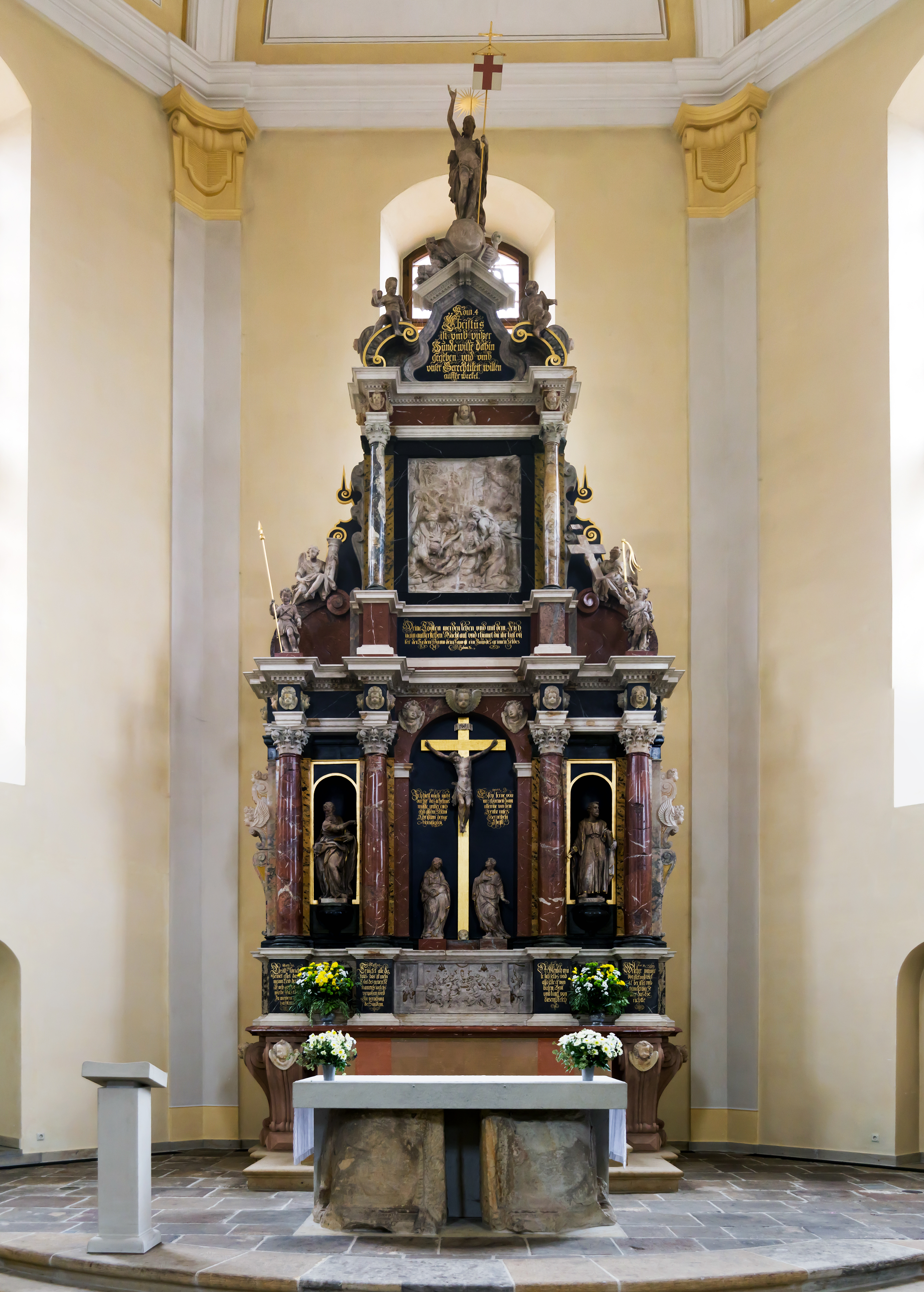 neu gestitcht, schärfer